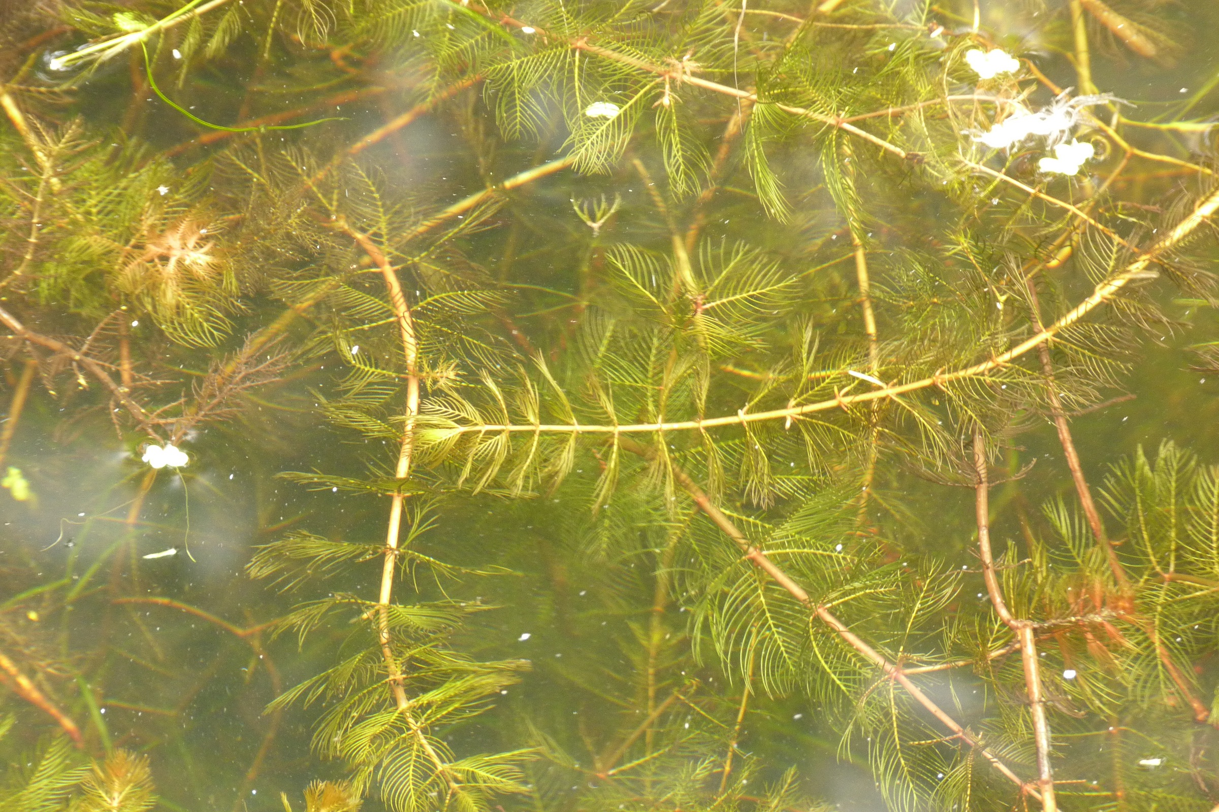 Myriophyllum spicatum L., Spiked Water-milfoil, Øregaard Museum grounds, Hellerup, Denmark, 1 September 2012